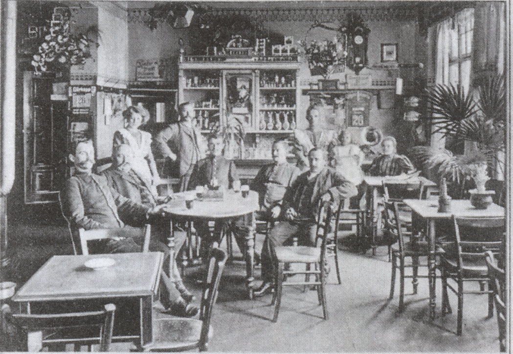 Innenaufnahme des Restaurant zur Post, Alt Fermersleben / Ecke Hohe Ufer Straße